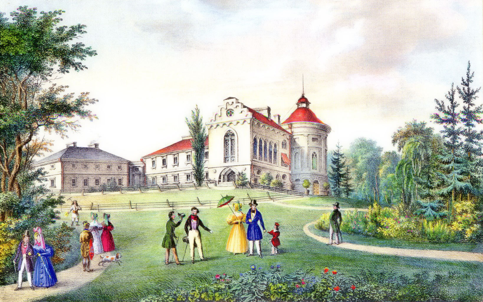 Кароль Ауер. Мостиська. Палац Страхоцьких (поч. XIX ст).